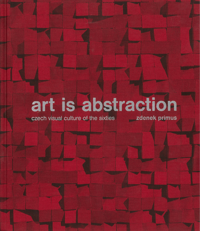 Obálka knihy Umění je abstrakce, Zdenek Primus